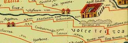 Extrait de la table de Peutinger centré sur Anderitum/Javols